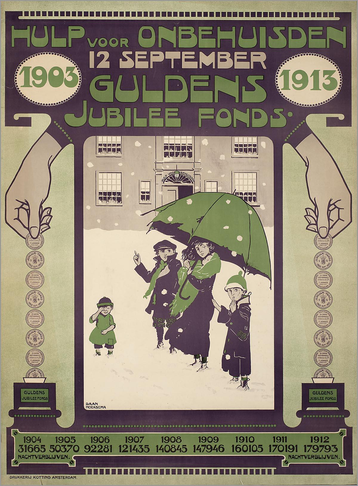 Affiche: Hulp voor Onbehuisden 1903 - 1913, Guldens Jubilee Fonds. Drukkerij Kotting